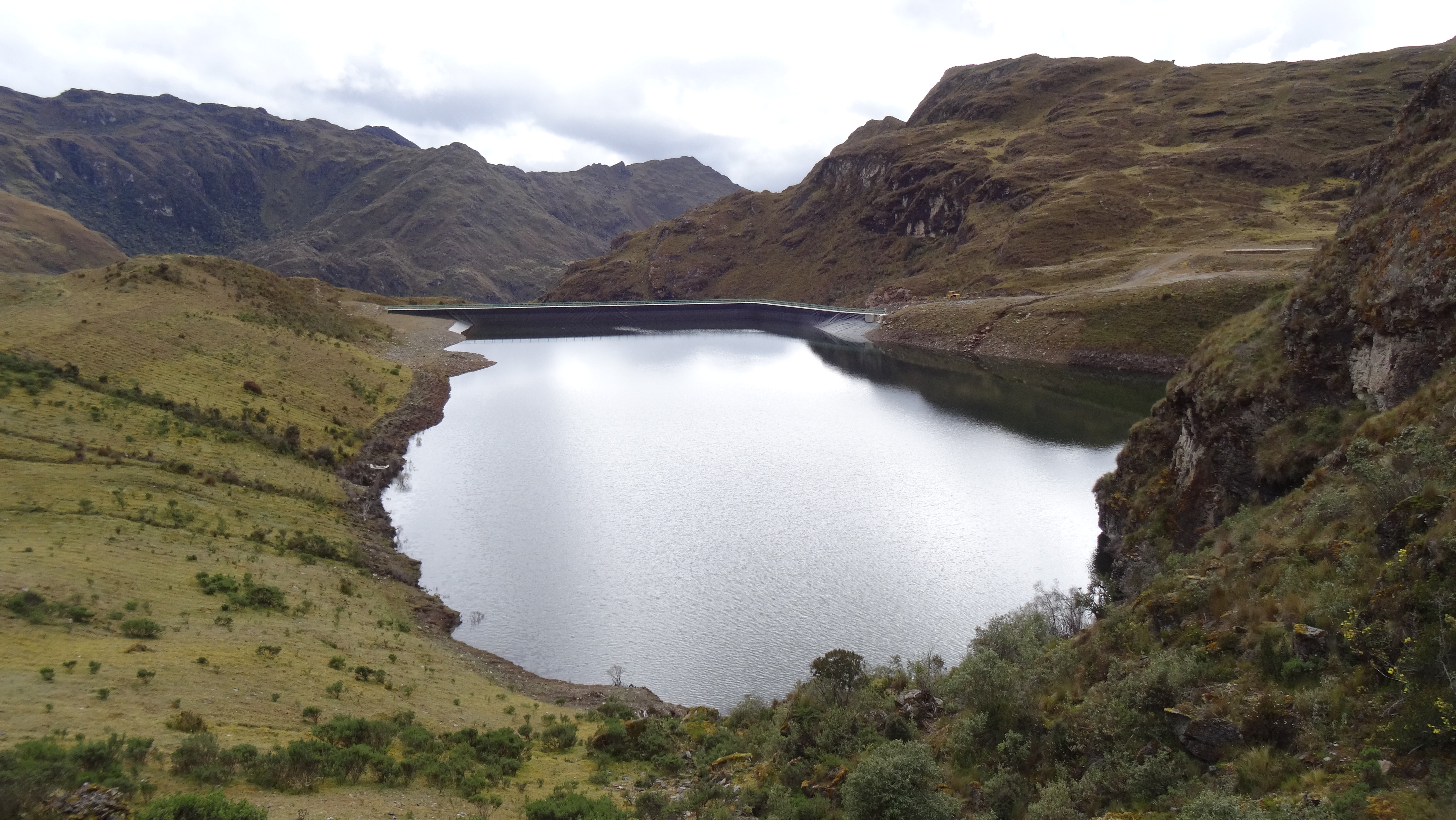 Laguna Tampush visto desde la parte alta del flanco oeste del cerro Totorapunta.